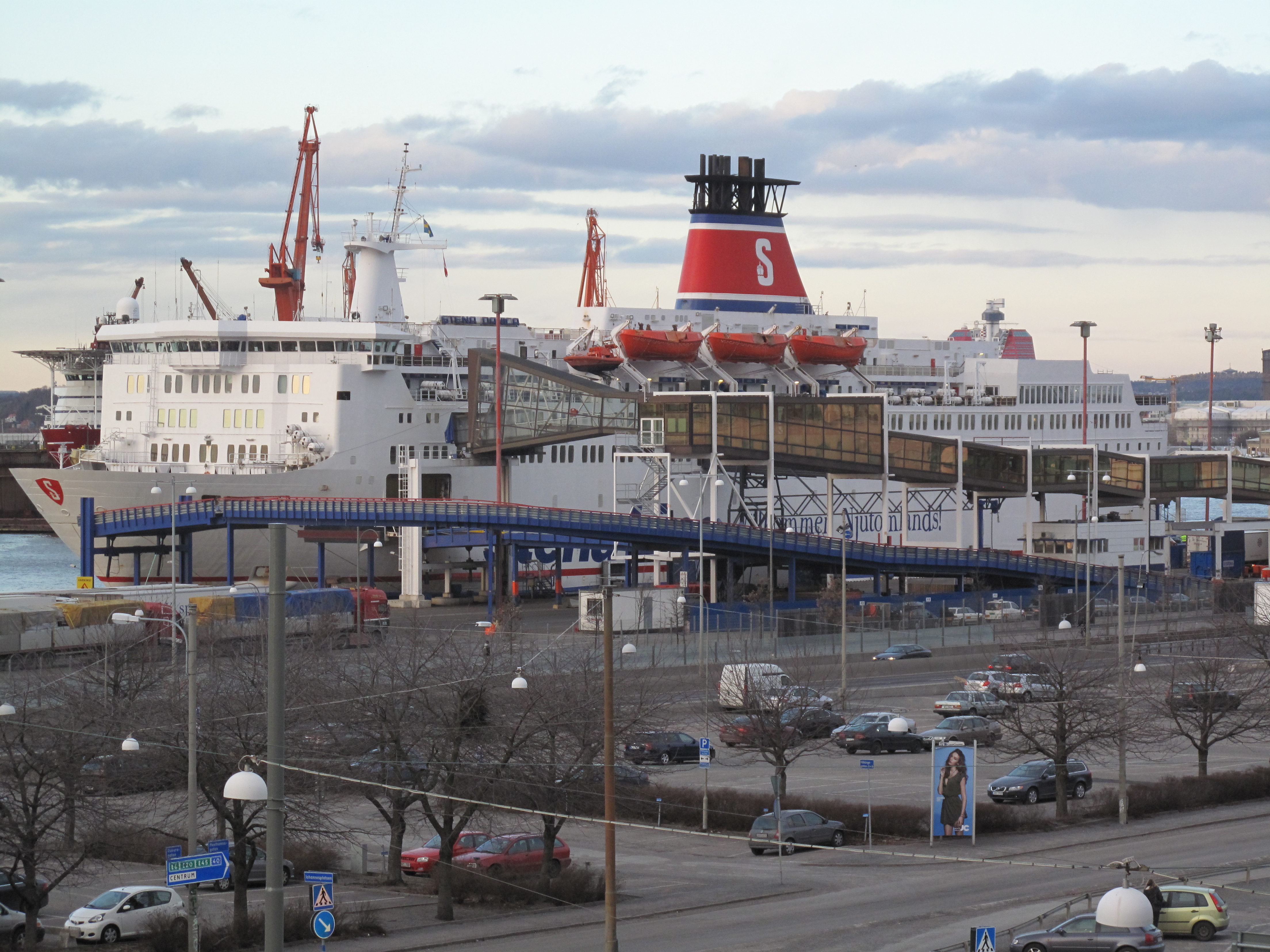 Stena Danica vid Danmarksterminalen i Göteborg. Information about Stena Danica may be found at IMO 7907245. A ship can change her name and flag state through time, but the IMO number remains the same through the hull's entire lifetime. Therefore, it's useful to identify a ship through her IMO number.